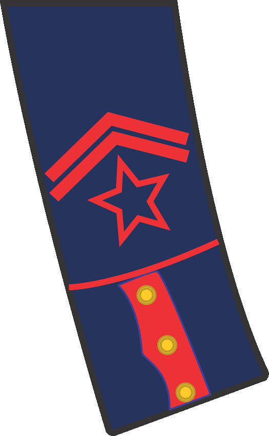 Insígnia do 1º A1-CFS de Aluno do Curso de Formação de Sargentos de Carreira